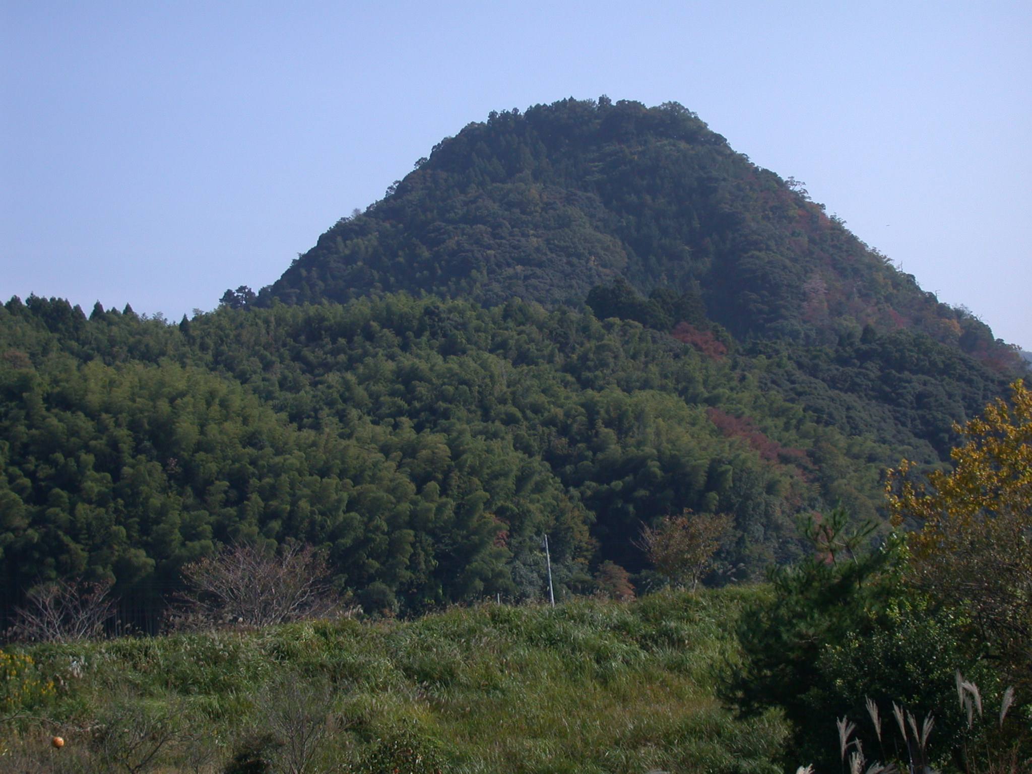 Gassan